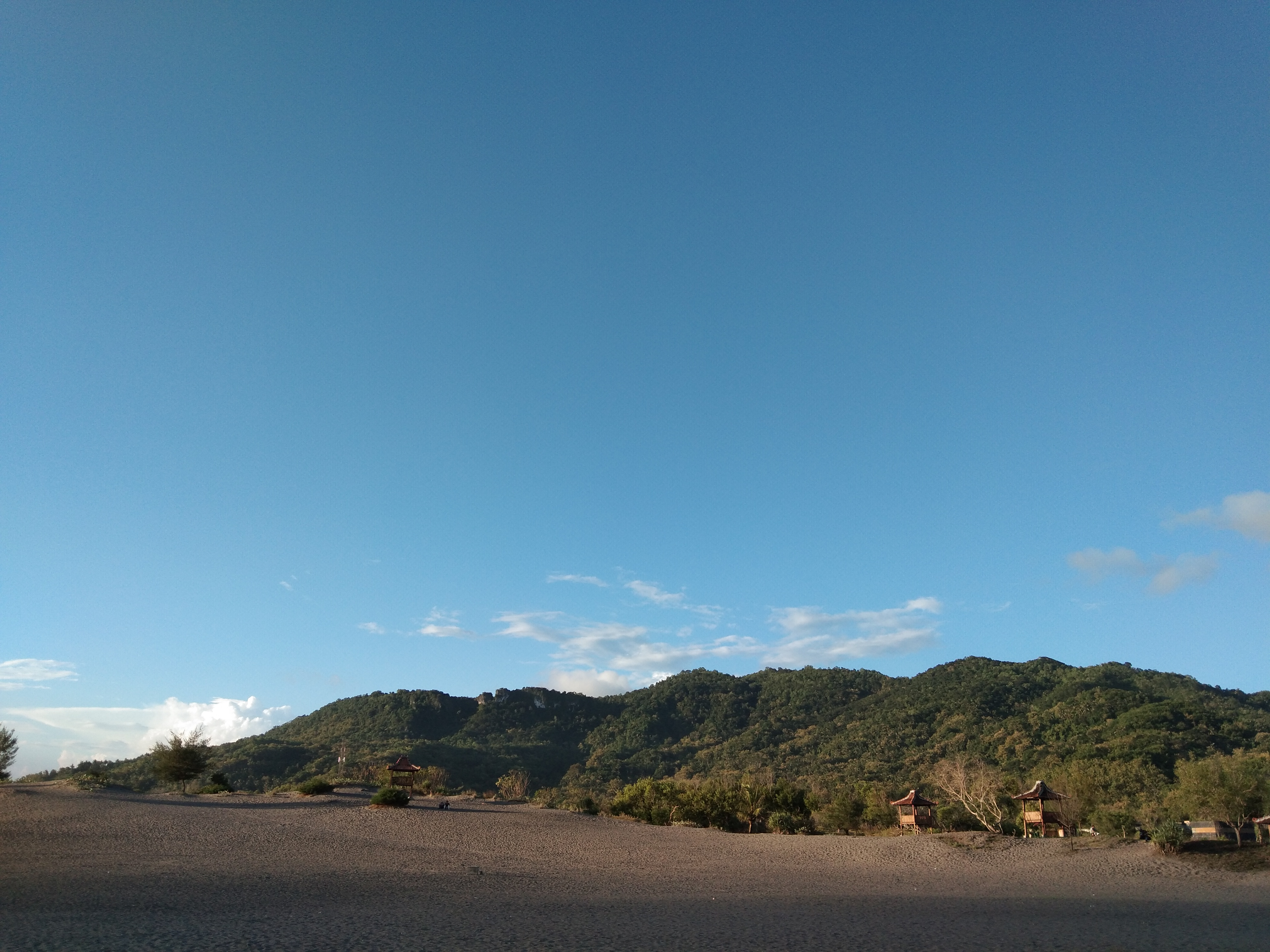 Gumuk Pasir Parangkusumo merupakan salah satu ikon dari kota Yogyakarta dan menjadi kawasan cagar alam geologi DIY. Gumuk pasir parangkusumo ini termasuk ke dalam tipe gumuk pasir barchan, salah satu tipe gumuk pasir yang langka. Gumuk pasir ini sangat cocok sebagai spot foto terlebih di waktu sore hari